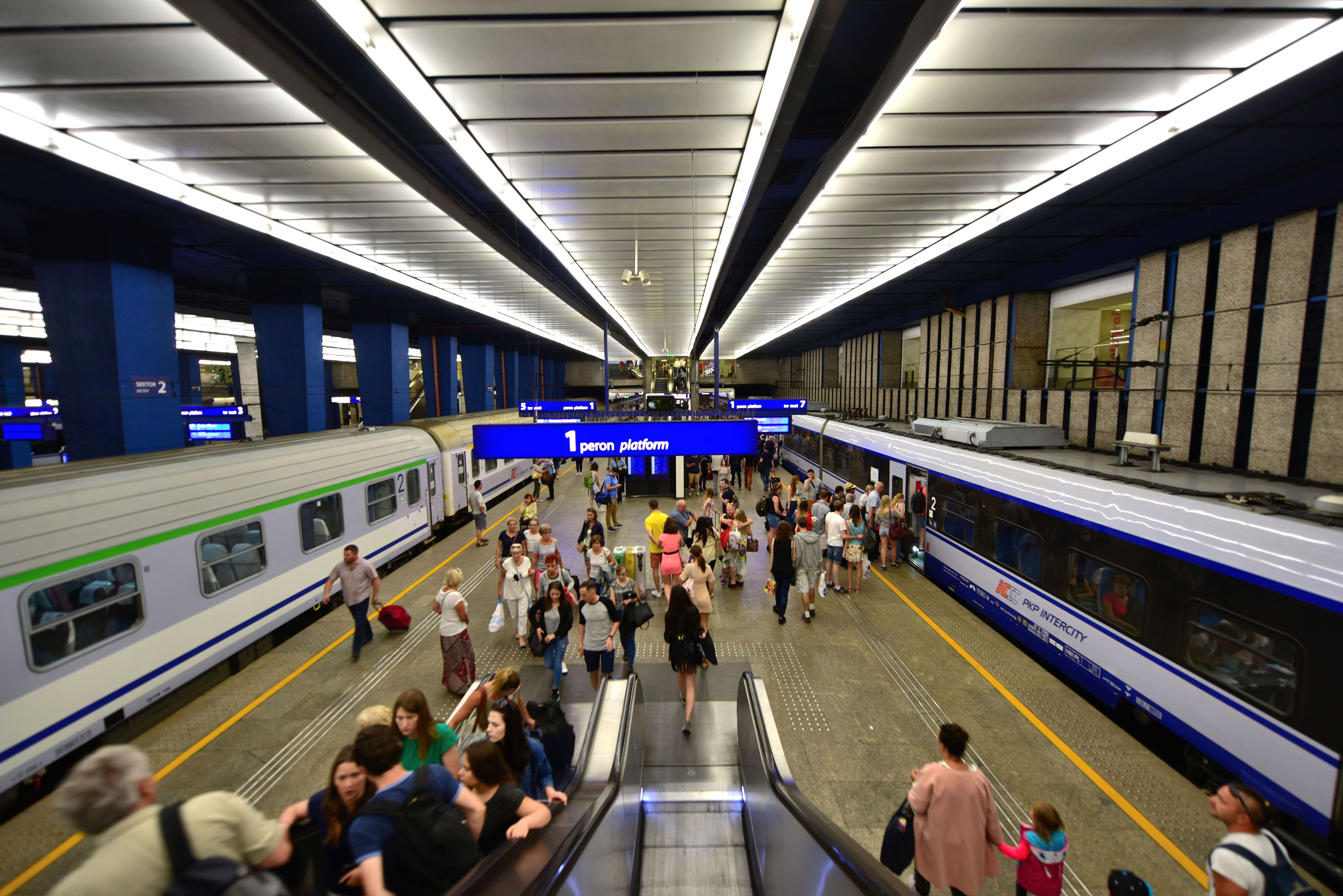 Dworzec Centralny w Warszawie. Peron 1